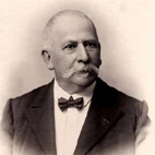 Louis Marcellin Bureau est un médecin et zoologiste français, né à Nantes le 18 novembre 1847.